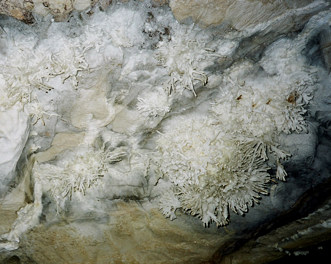 Aragonite flowers in the ceiling of Gruta da Torrinha, Chapada Diamantina, Bahia, Brasil. Flores de aragonita no teto da Gruta da Torrinha, Chapada Diamantina, Bahia Brasil.